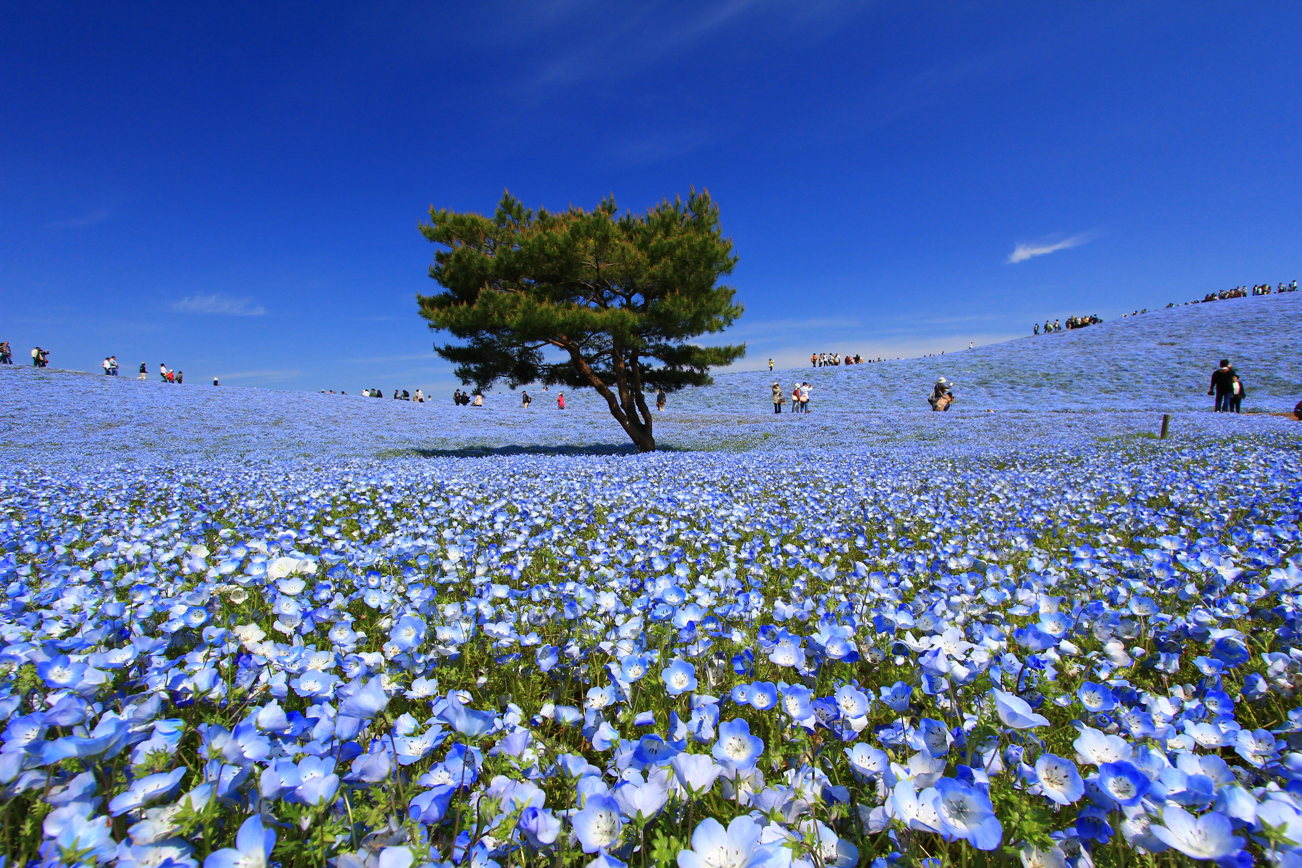 ひたち海浜公園